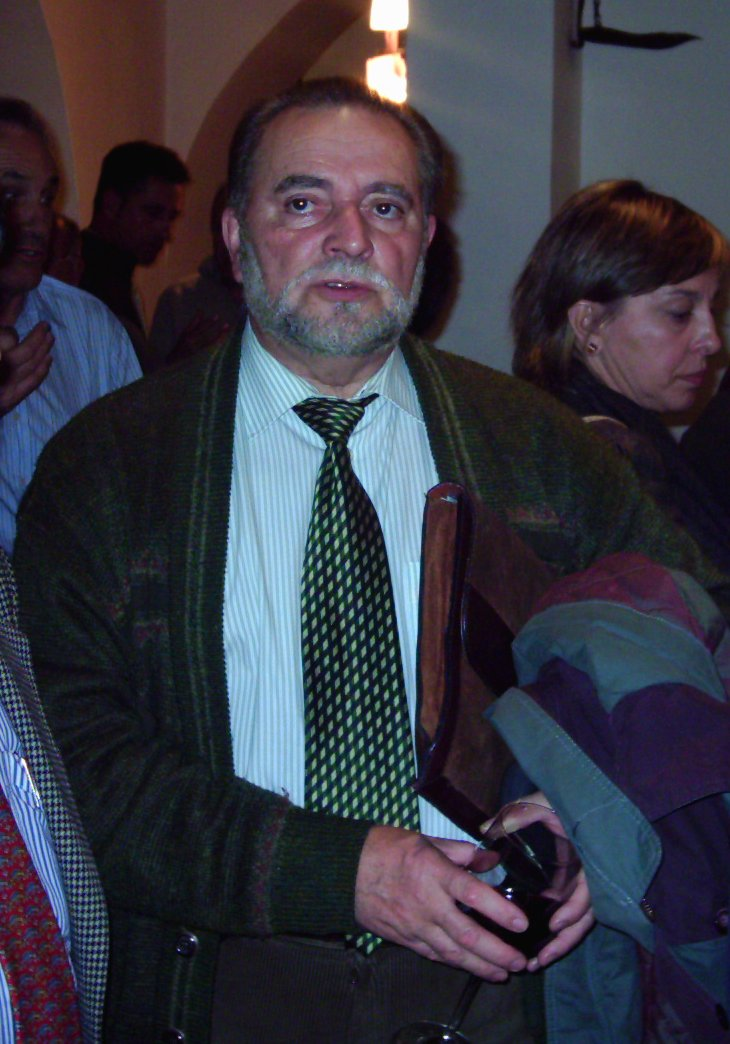 Julio Anguita en el Ateneo de Córdoba (Bodegas Campos) el 22 de noviembre de 2004.